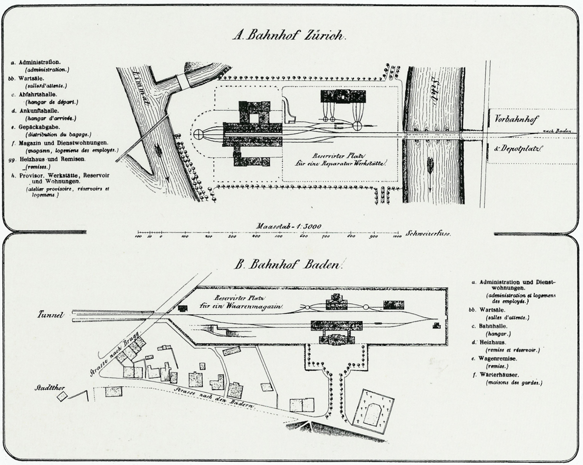 Grundrisse des Nordbahnhofs in Zürich nach dem Entwurf von Gustav Albert Wegmann und des Nordbahnhofs Baden von Ferdinand Stadler.